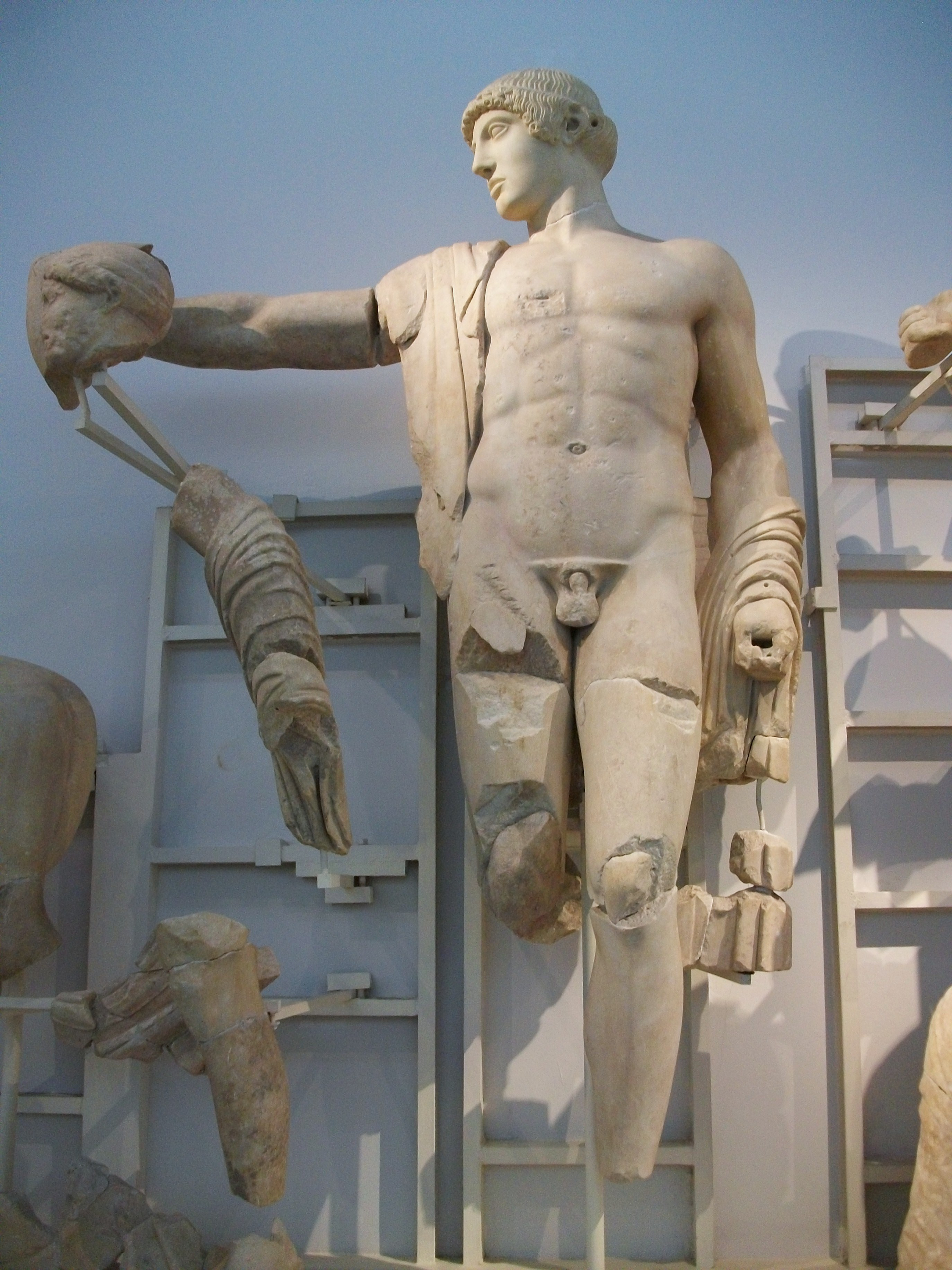 Apol·lo, escultura central del frontó occidental del temple de Zeus, Museu Arqueològic d'Olímpia.